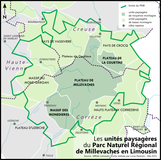 Carte des unités paysagères (telles que définies par la DREAL) du PNR de Millevaches en Limousin (France)